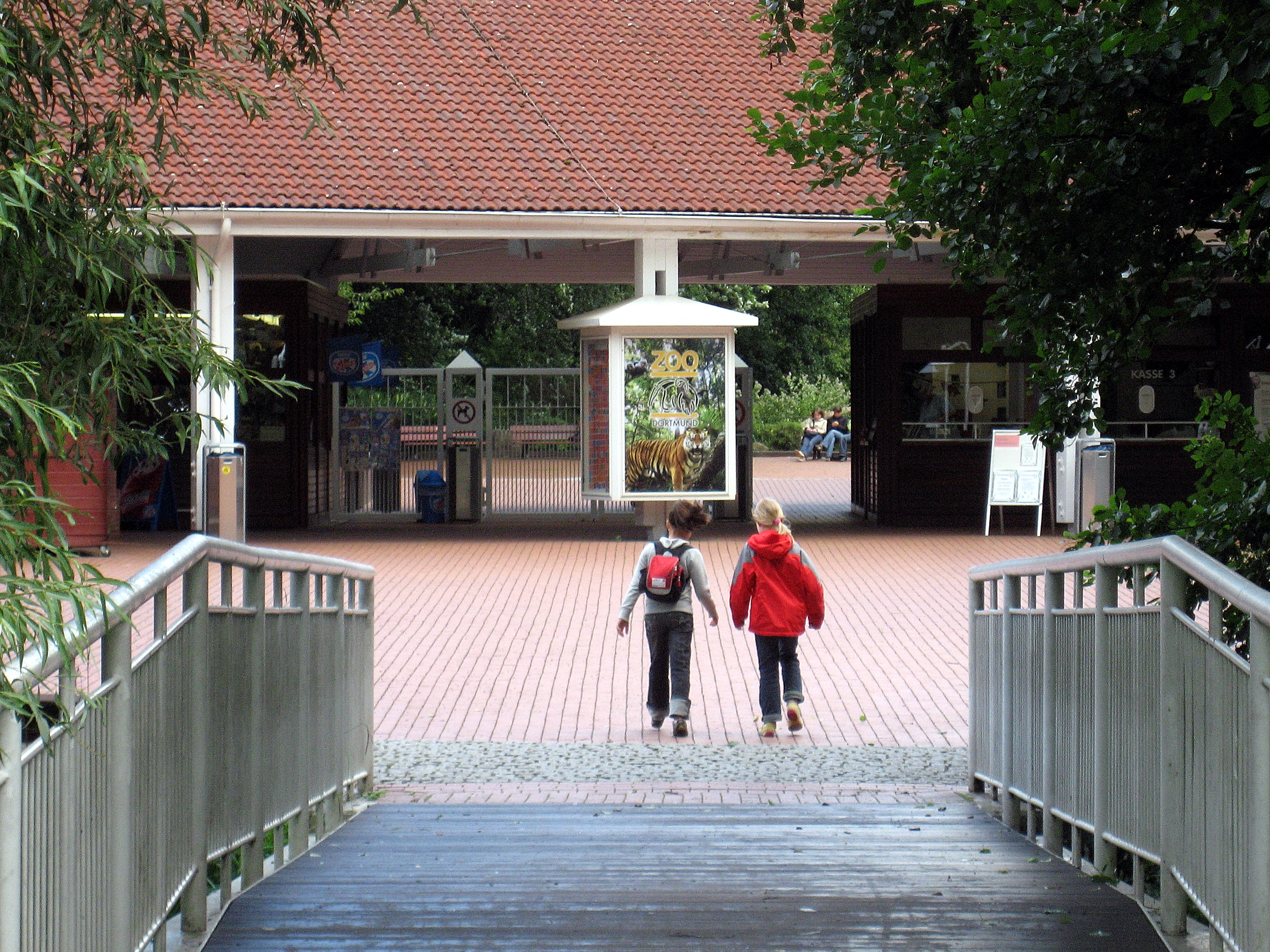 Dortmund, Tierpark, Zoo, Eingang